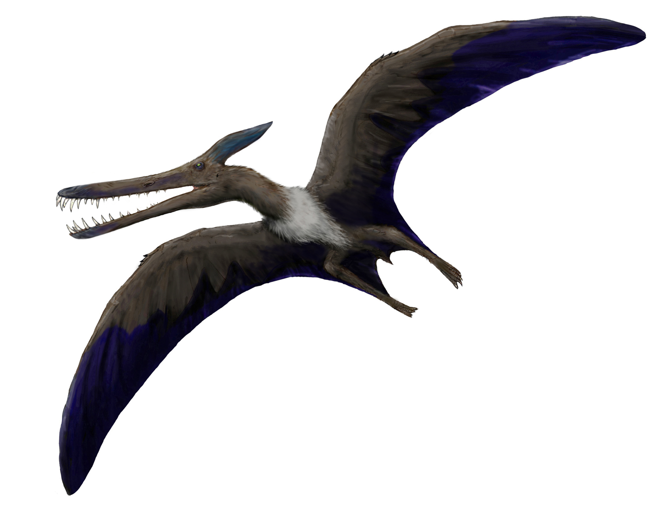 Ludodactylus sibbicki.